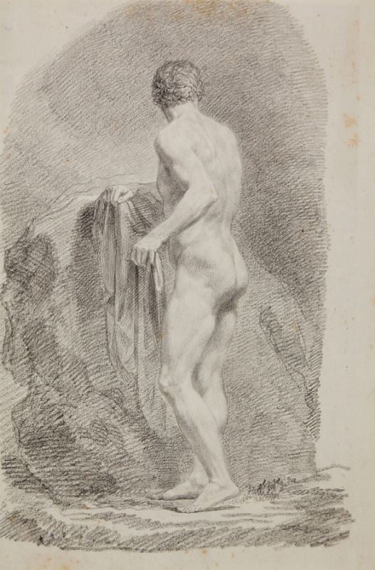 Pelagio Palagi (Bologne 1775 - Turin 1860), Académie de dos de trois quarts. Coll. part.